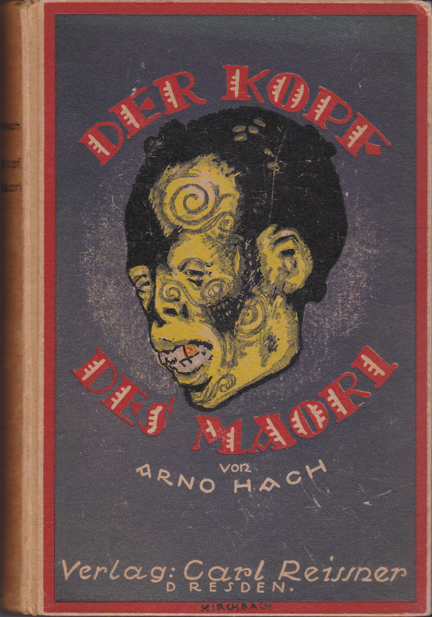 Arno Hach - Der Kopf des Maori